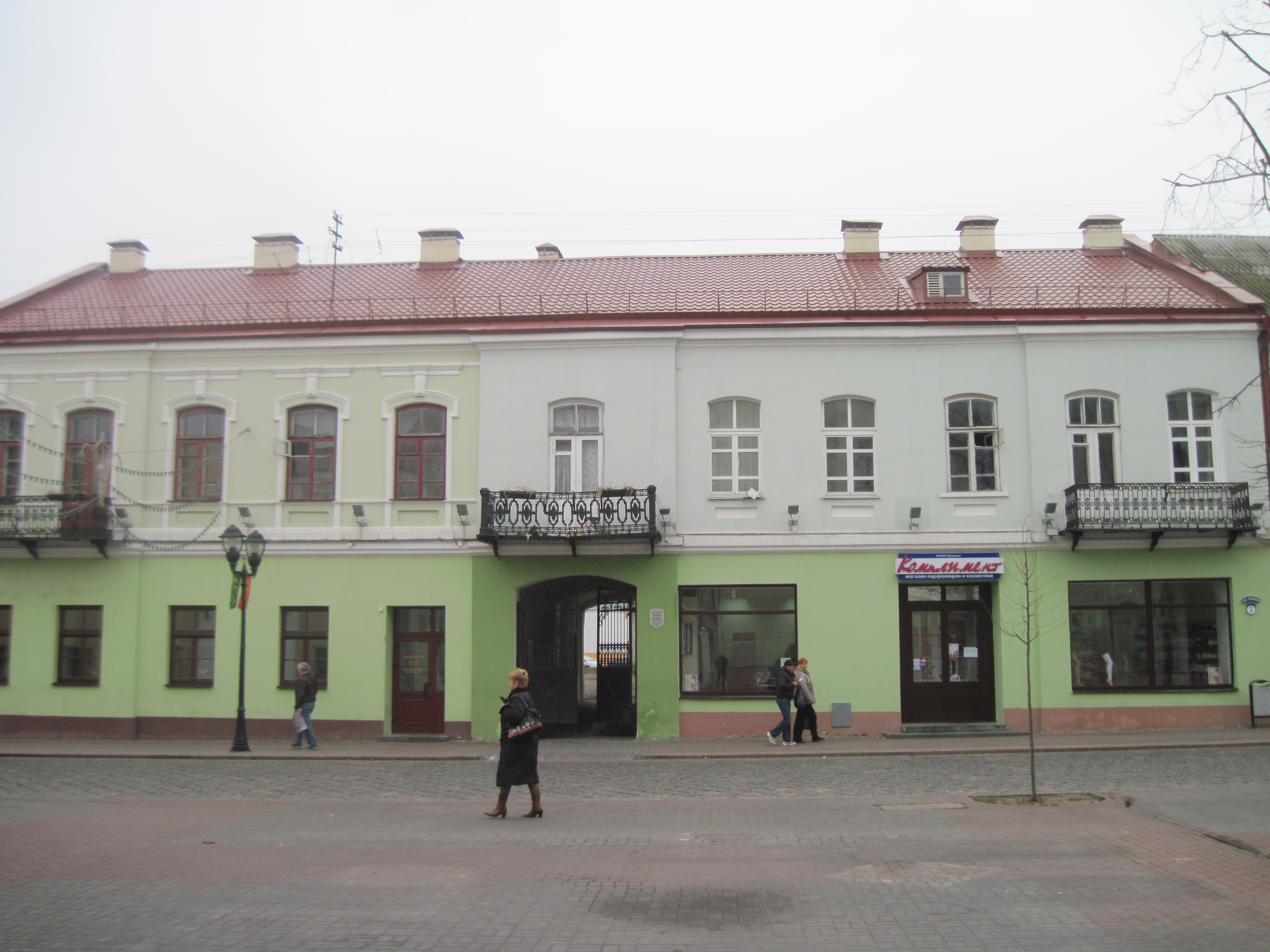 Беларуская (тарашкевіца): Фота будынка па вуліцы Савецкая, 3, у Гродне